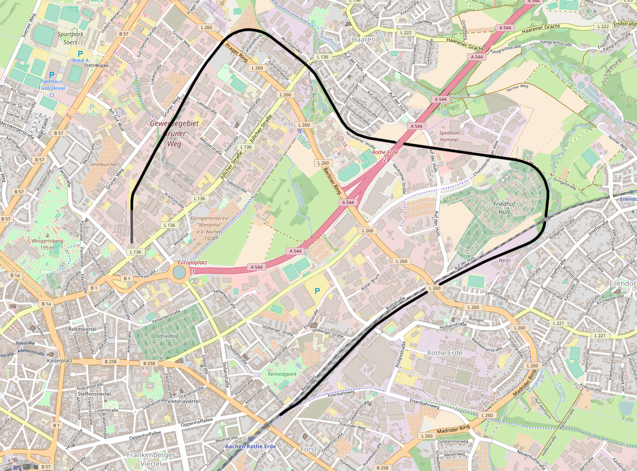 DB 2560, Aachen Nord - Aachen-Rothe Erde